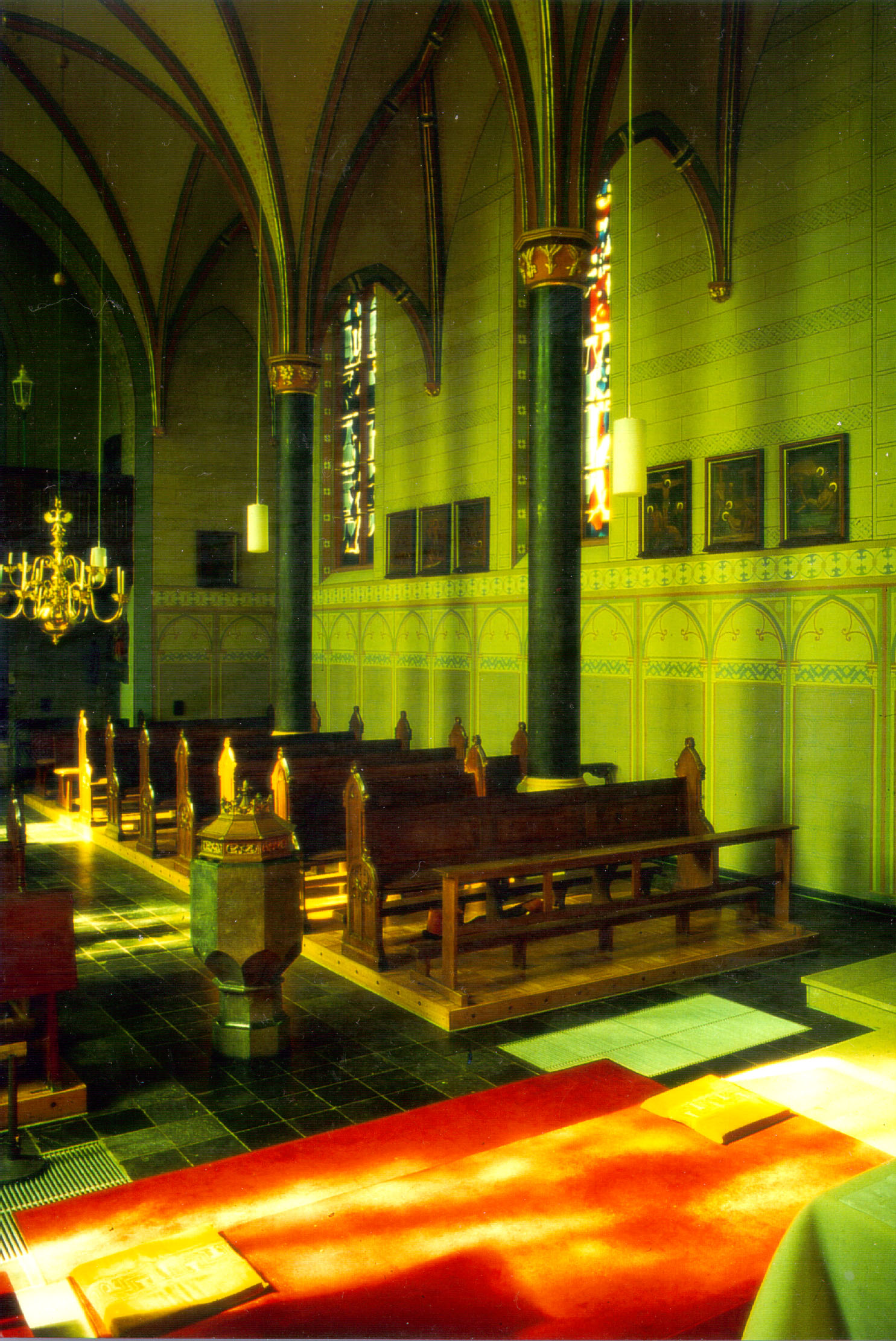 Aachen-Orsbach: Kath. Pfarrkirche St. Peter und Paul (1863–1864), Innenraum nach NW